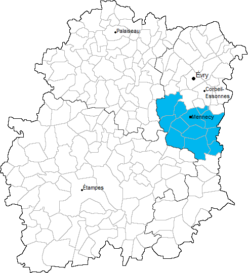 Carte de localisation du canton de Mennecy en Essonne (91)